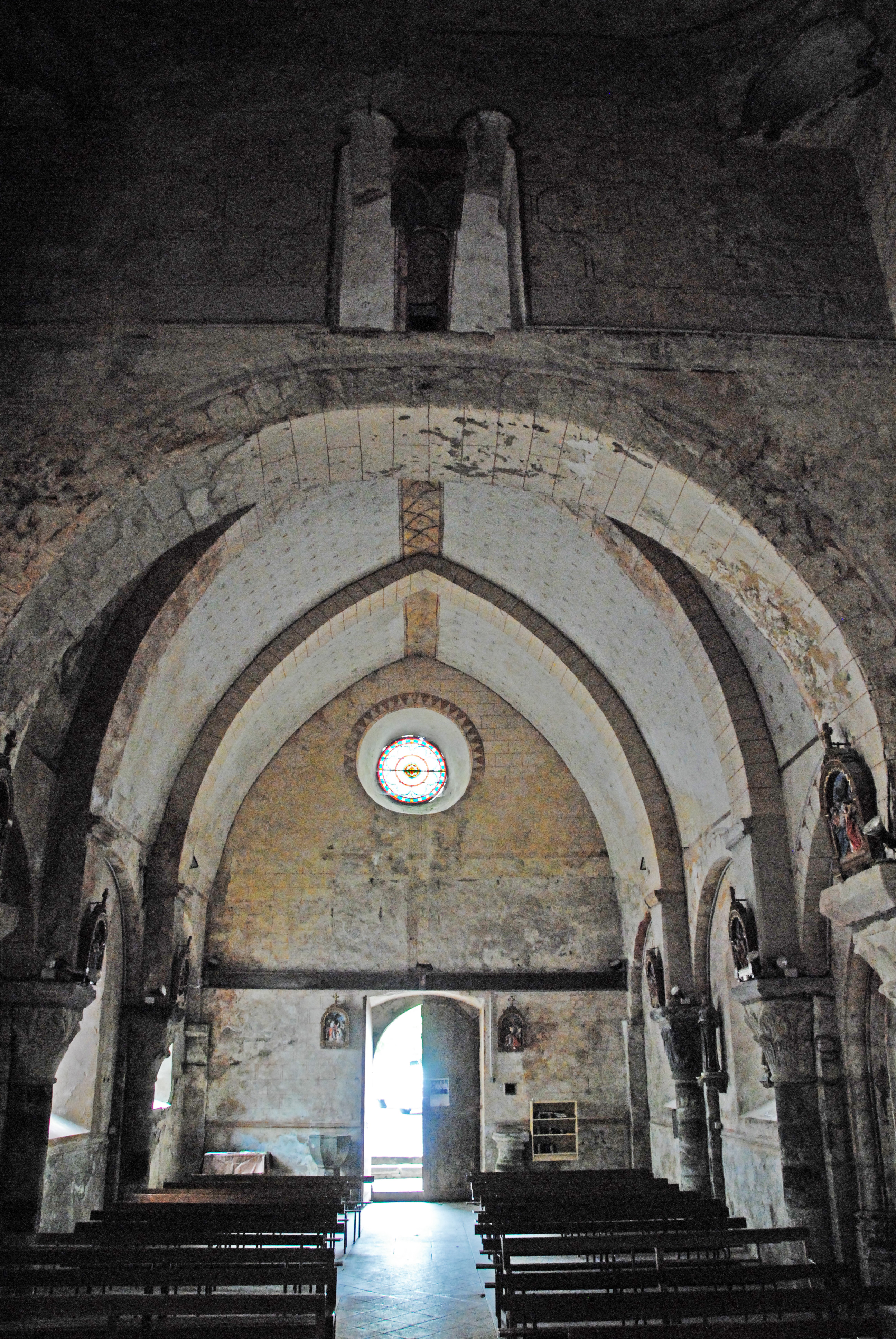 Dorfkirche Chambon-sur-Lac, Schiff aus Vierung